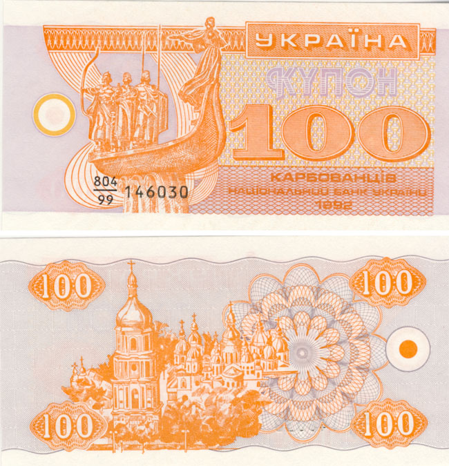 100 карбованців 1992 року